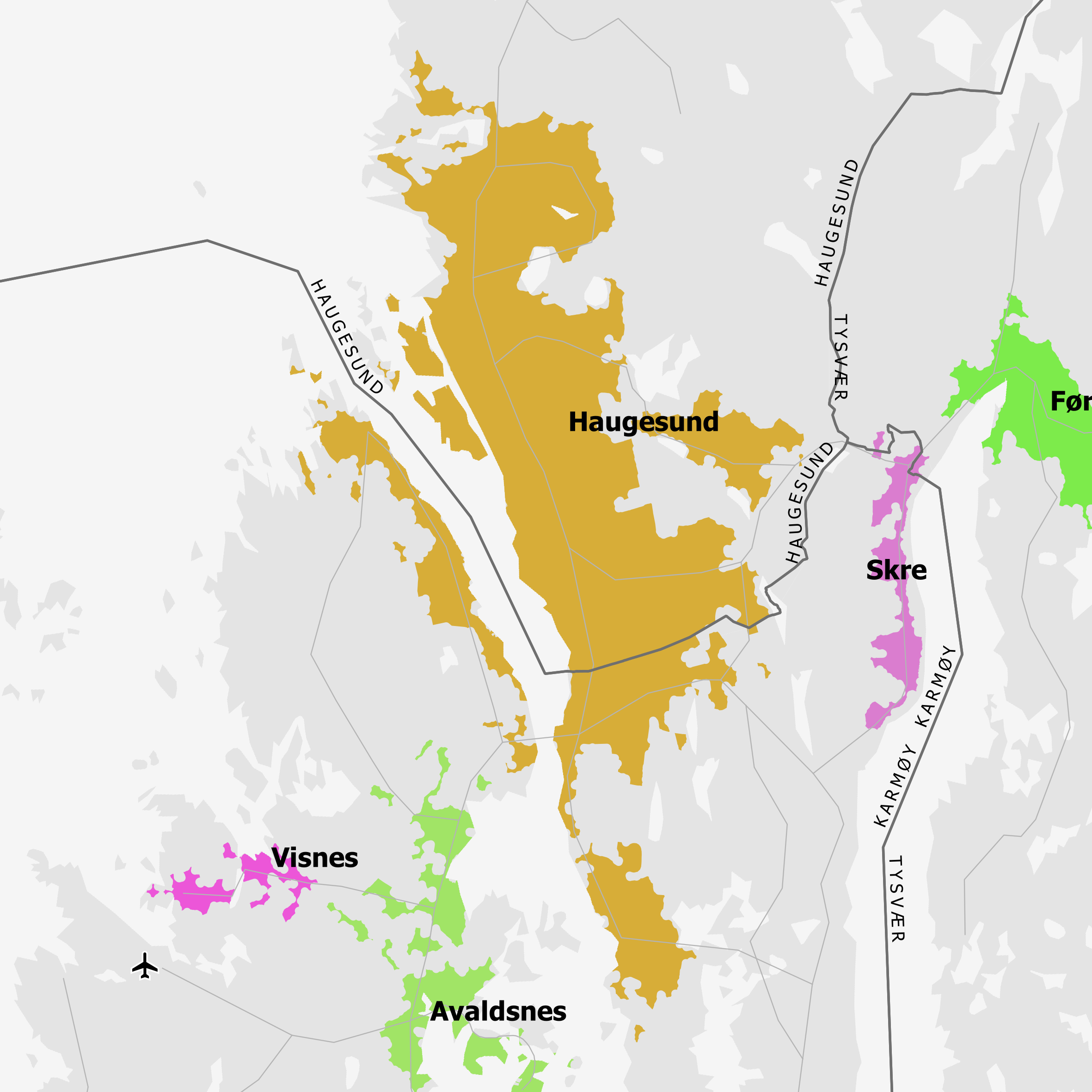 Tettsted 4532 Haugesund pr. 1.1.2018